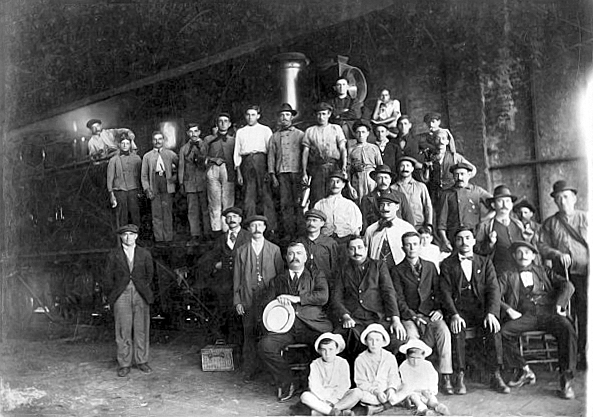 Empleados ferroviarios en estación Merlo, principios de siglo 20.